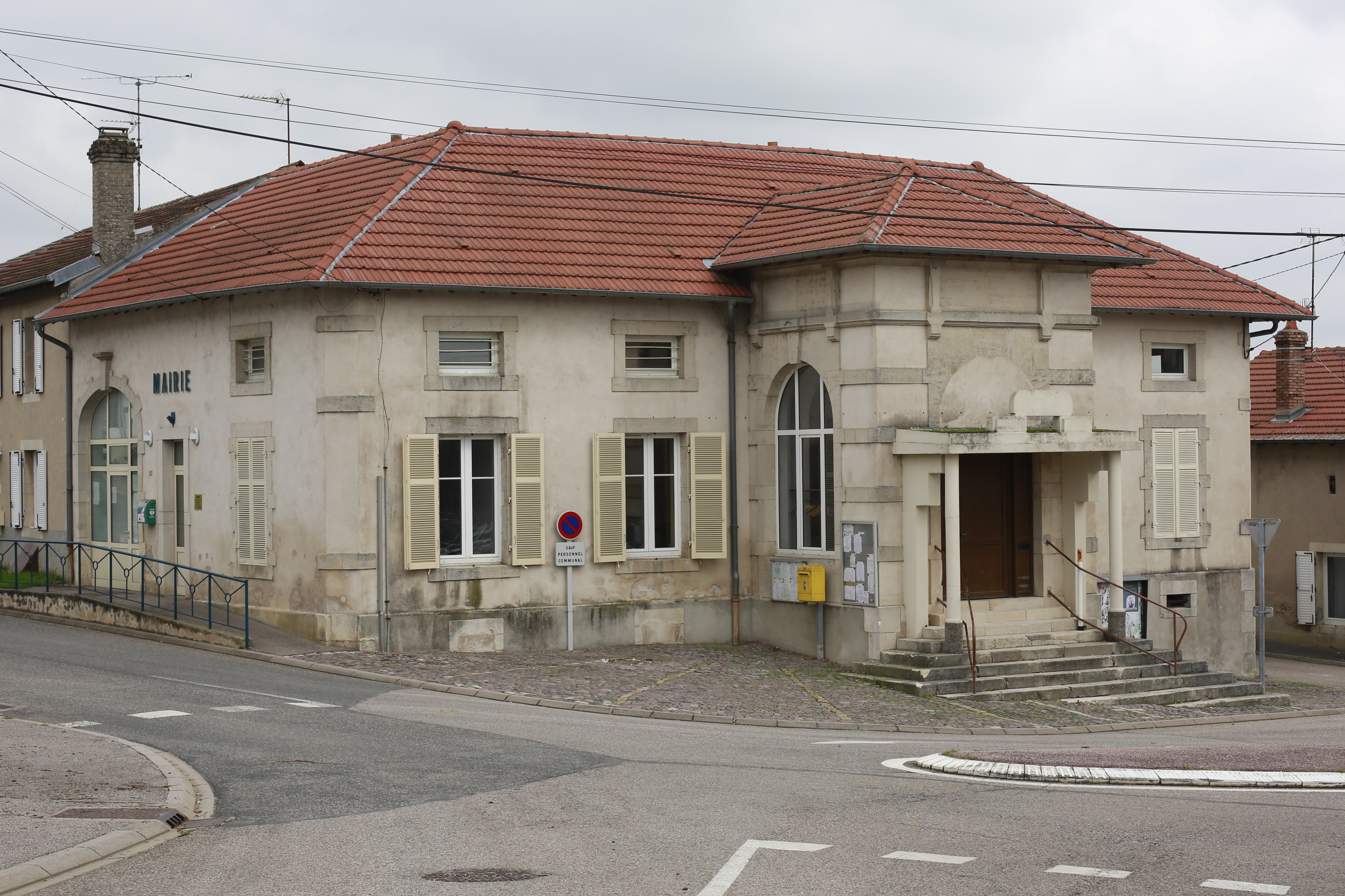 Mairie de Vitrimont.